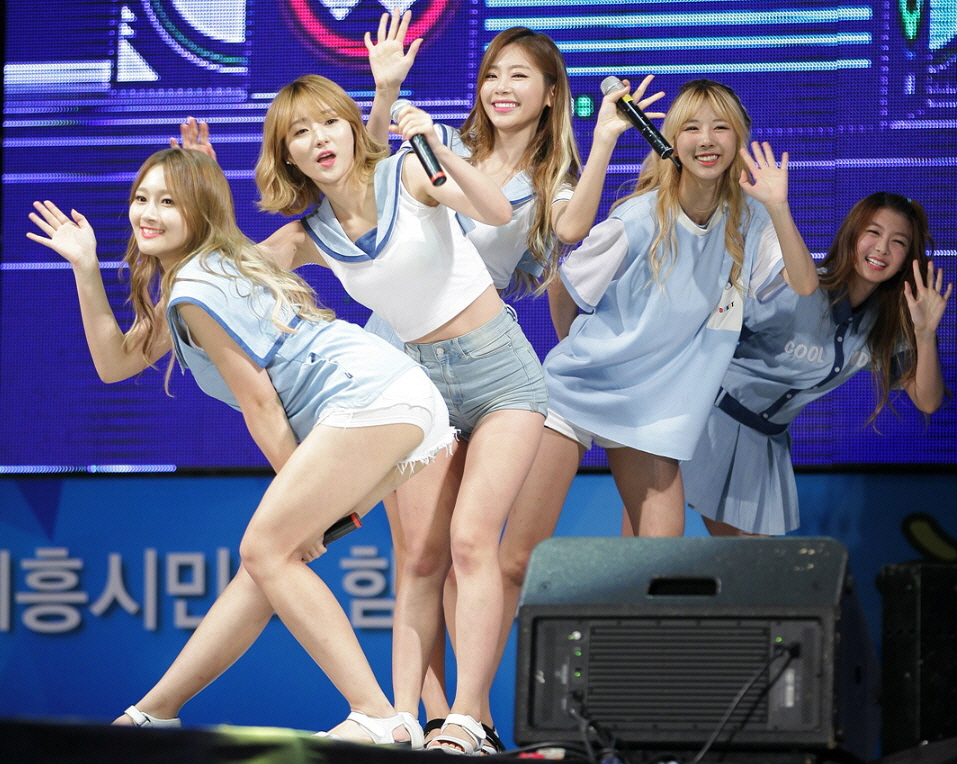 밍스(MINX) 착한콘서트 시흥 배곧신도시 생명공원